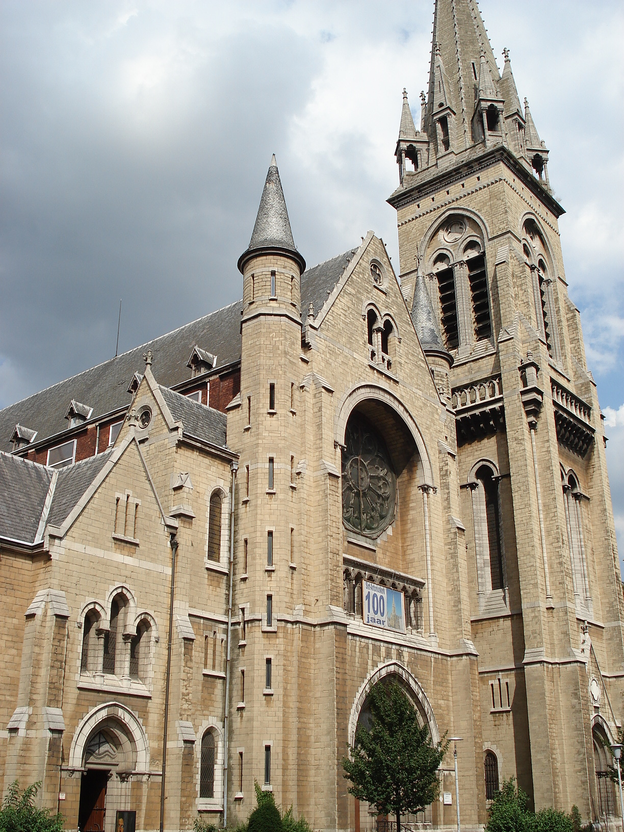 Anvers, Belgique : église néogothique Saint-Antoine (néerl. Sint-Antoniuskerk), sise Paardenmarkt (pl. du Marché-aux-Chevaux), oeuvre de l'archit. Jules Bilmeyer, 1908.